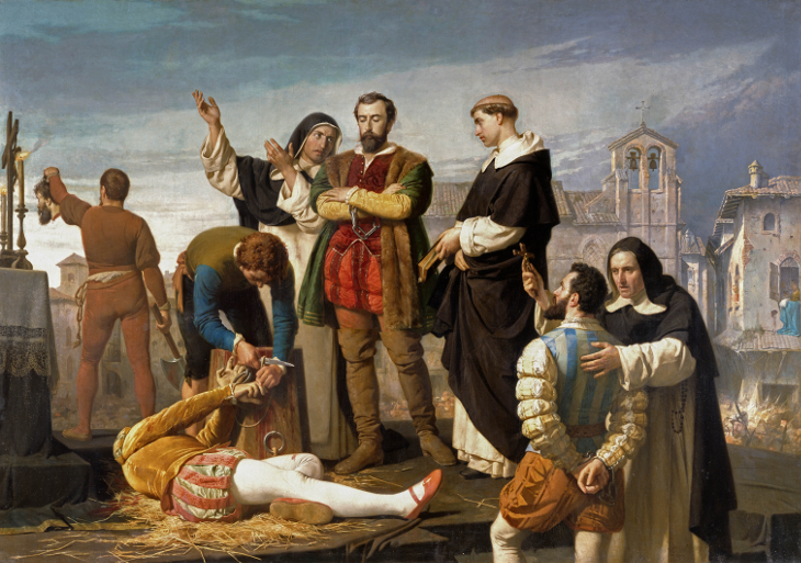 Esta obra representa la ejecución de los comuneros Juan de Padilla, Juan Bravo y Francisco Maldonado, que se llevó a cabo en Villalar el día 24 de abril de 1521, y fue adquirida por el Estado español por la cantidad de 80.000 reales, y actualmente se expone en el Congreso de los Diputados de España.